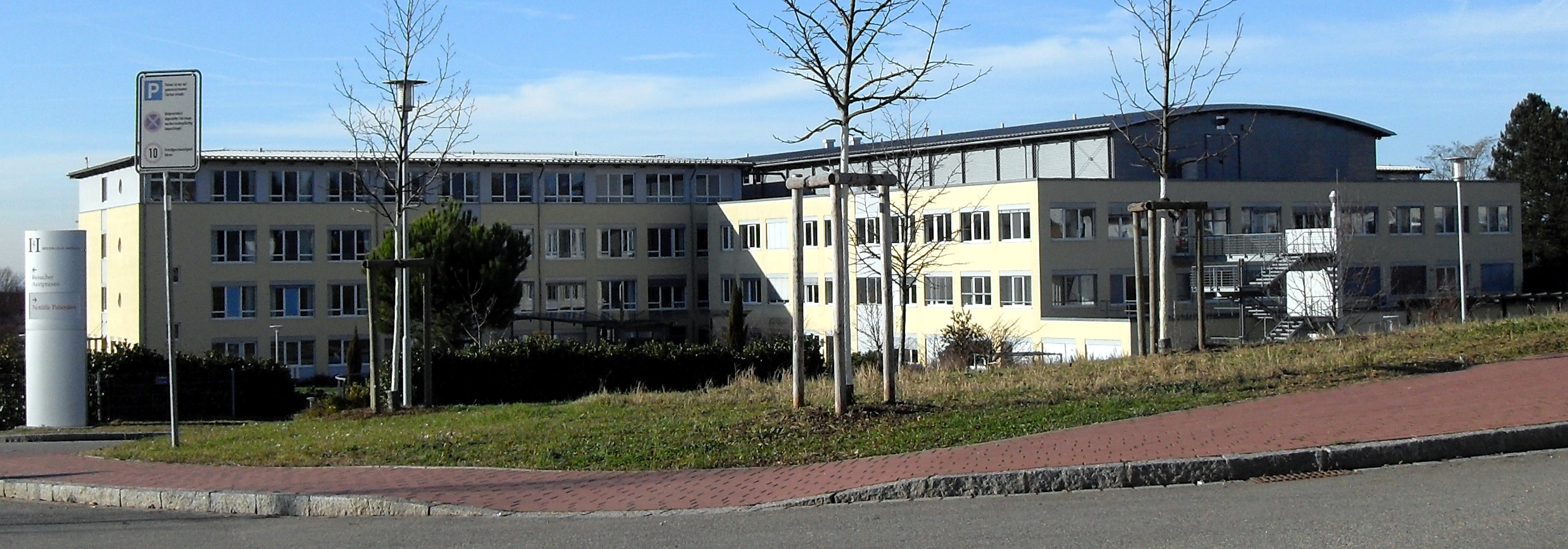 Helios Klinik in Müllheim, Baden